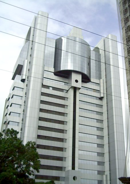 Edifício comercial na avenida Berrini, São Paulo.